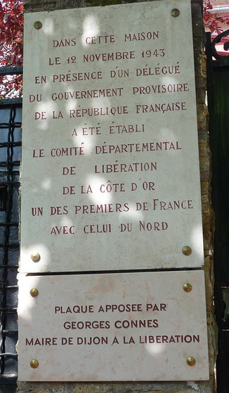 Plaque posée au 17 rue Alexandre Nicolas à Dijon en l'hommage de la création du CDL de la Cote d'Or le 12/11/1943 dans cette maison